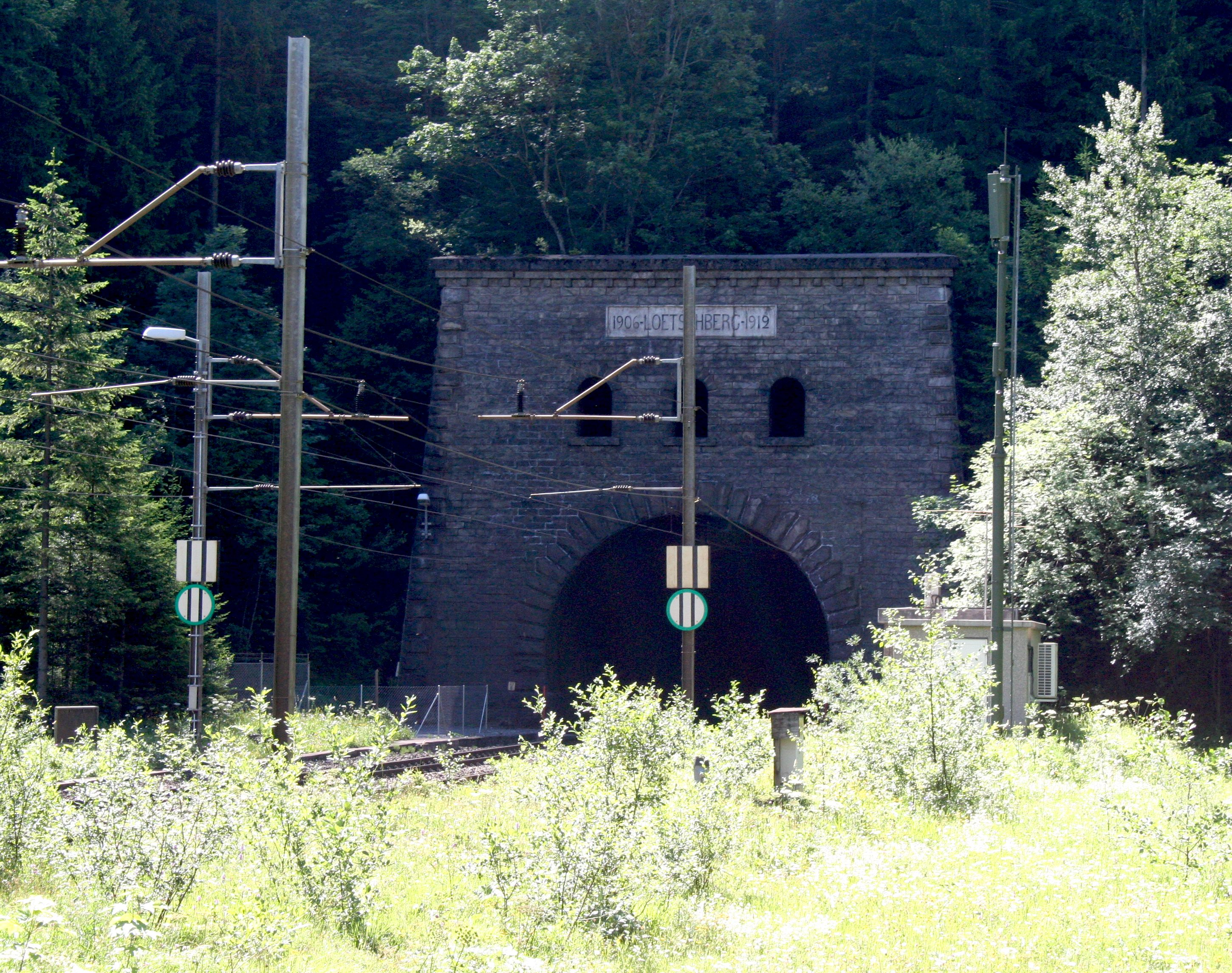 Nordportal des Lötschbergtunnels bei Kandersteg BE